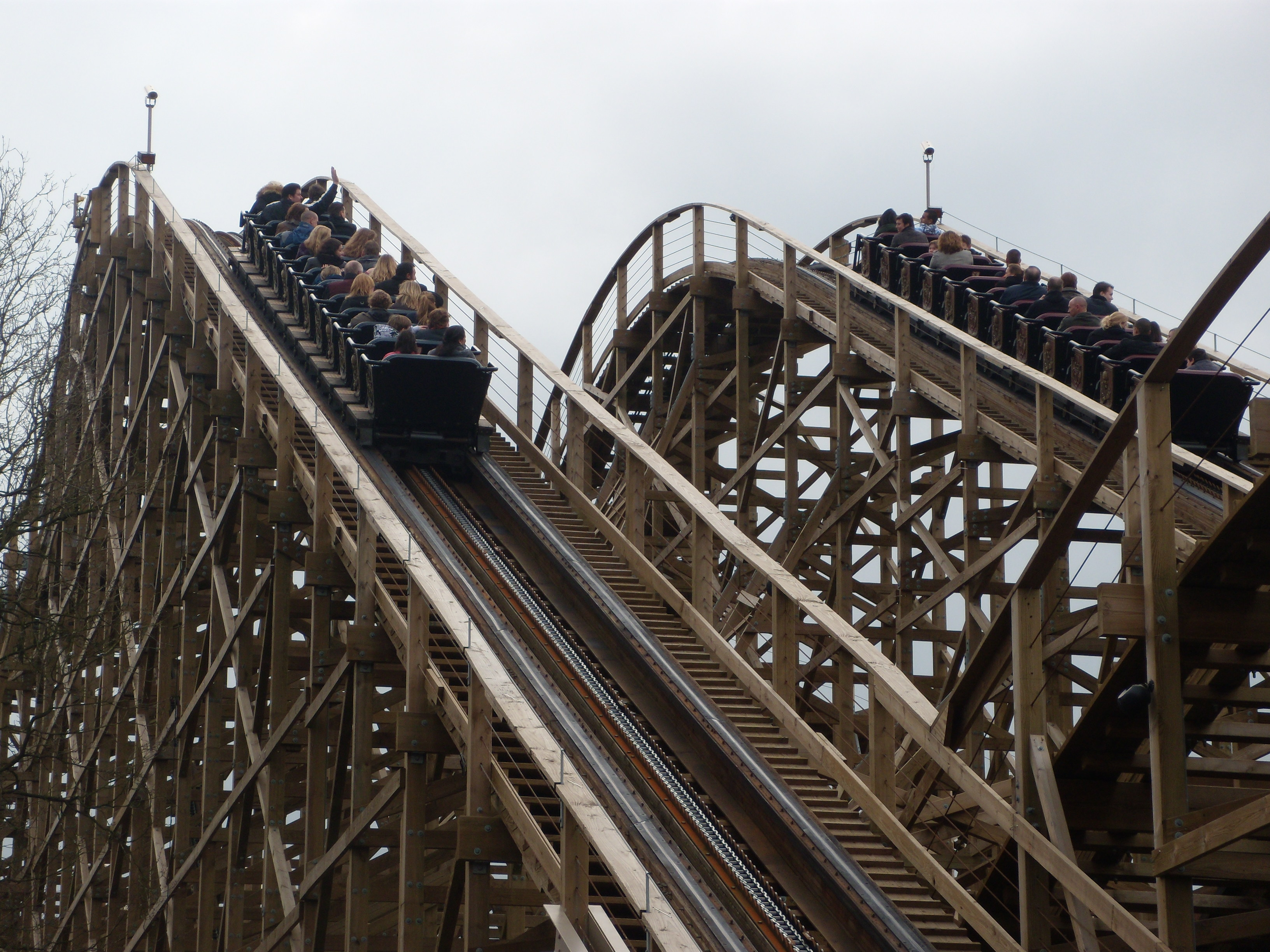 Double voie des montagnes russes Joris en de Draak dans le parc d'attractions néerlandais Efteling.